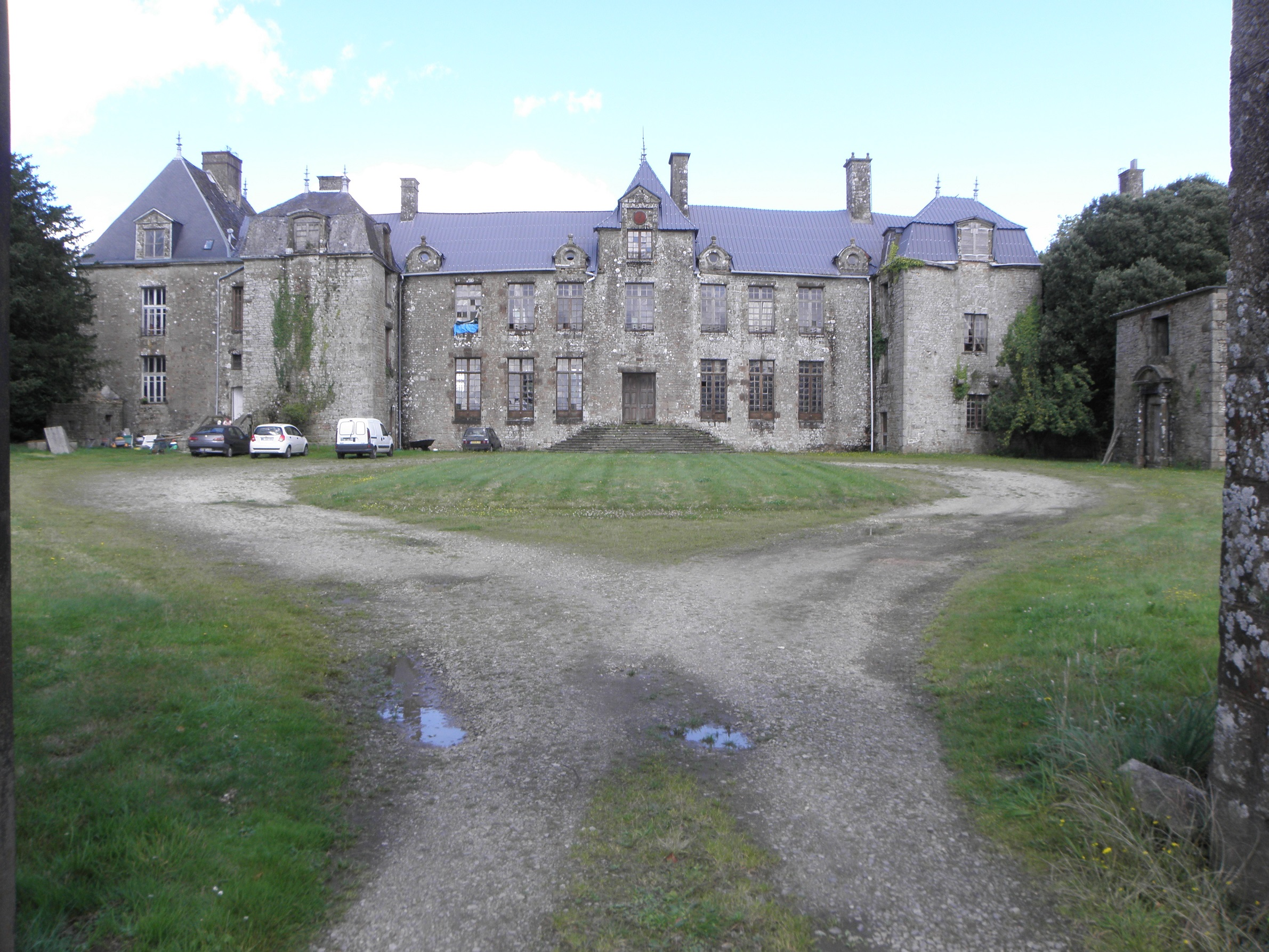 Château de Montflaux, commune de Saint-Denis-de-Gastines (53)